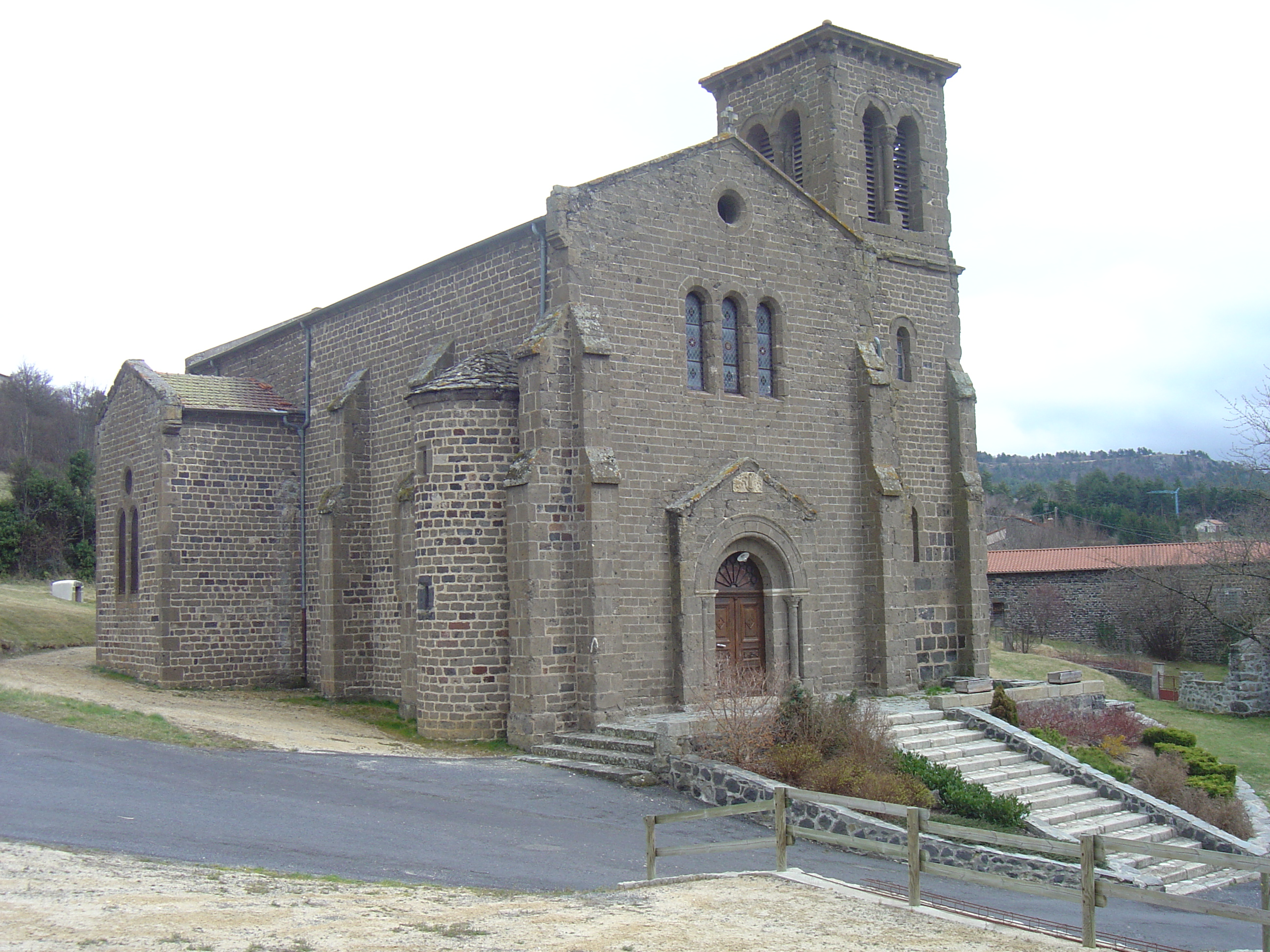 Eglise de Chadron